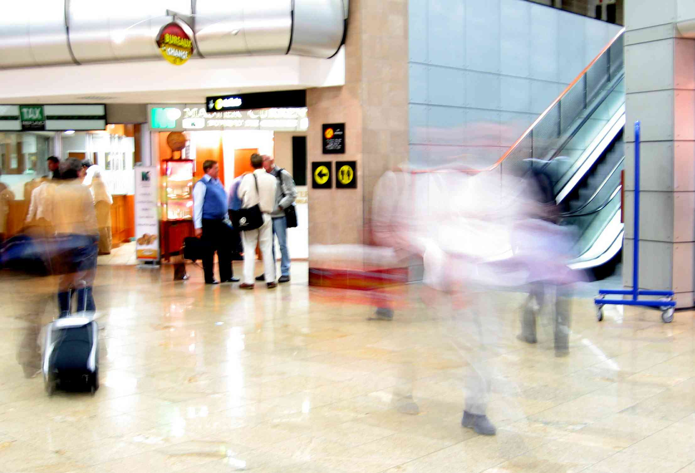 Some blur problems due to subject movement / camera movement